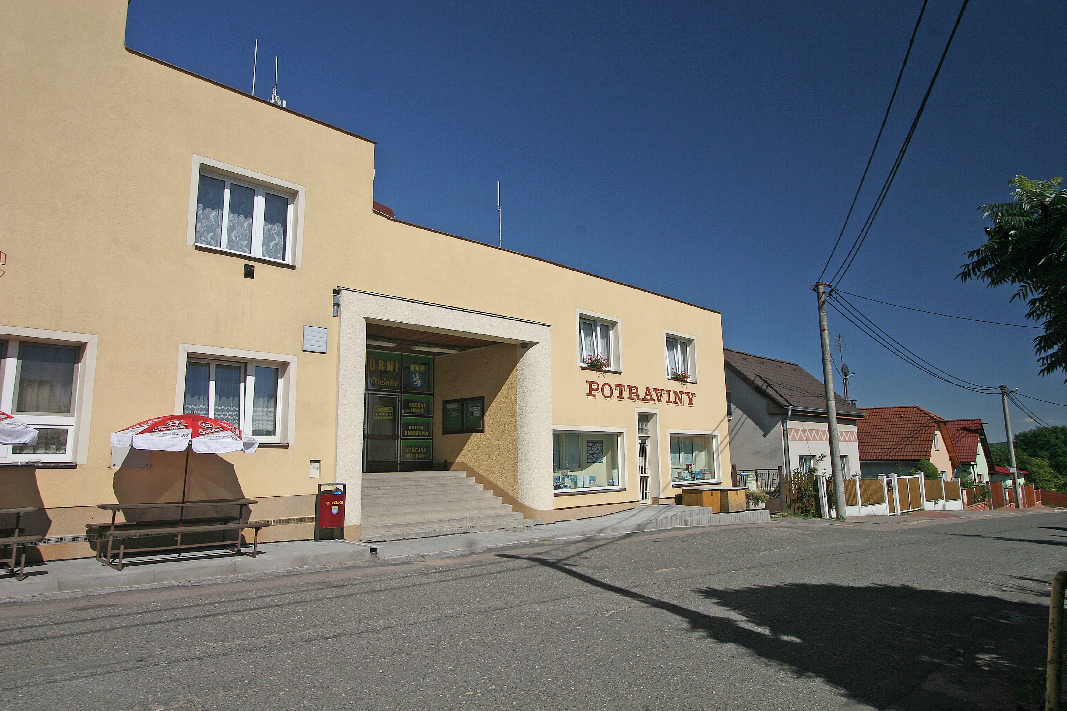 Olešnice prodejna